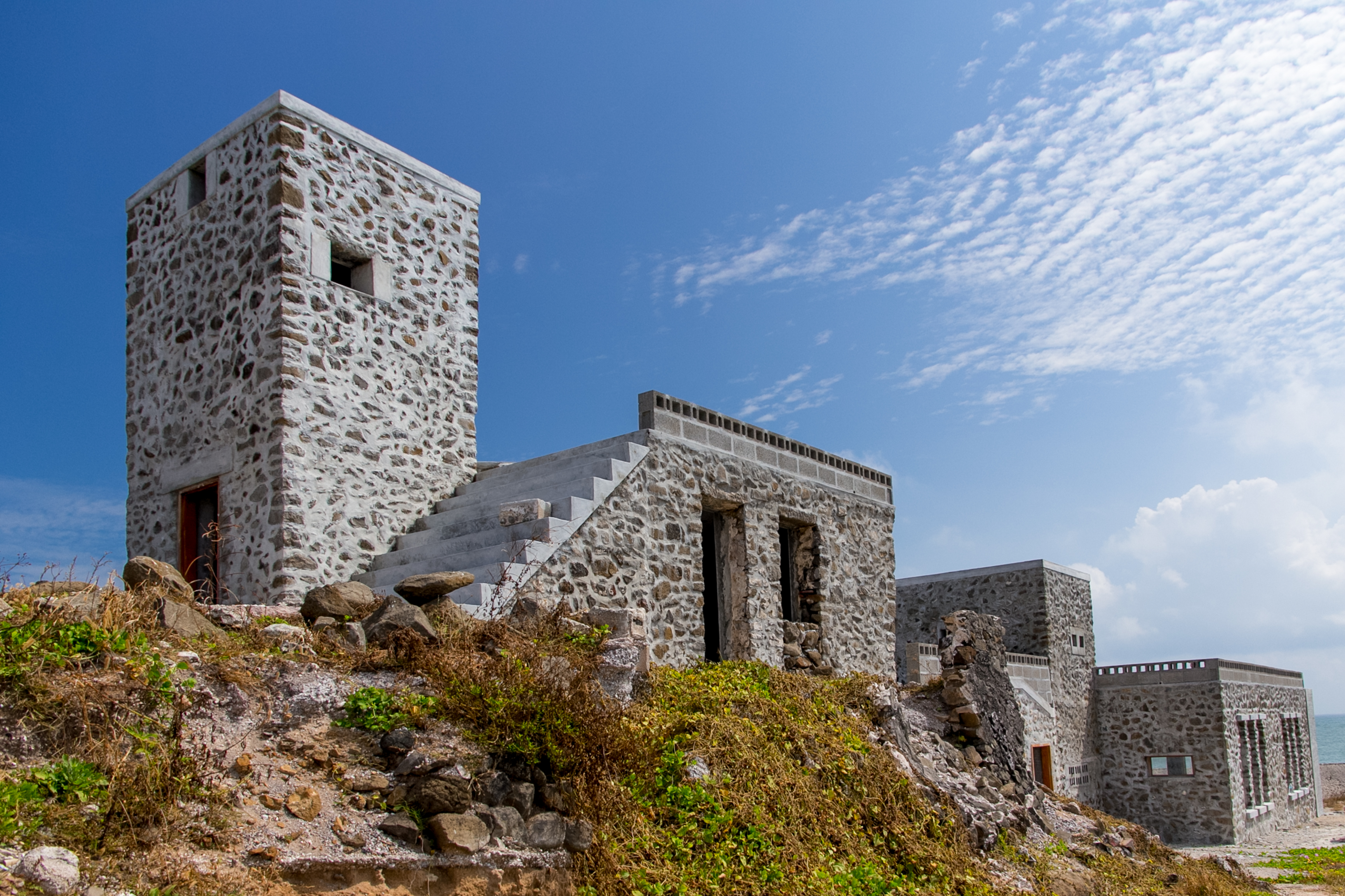 湖西菓葉灰窯